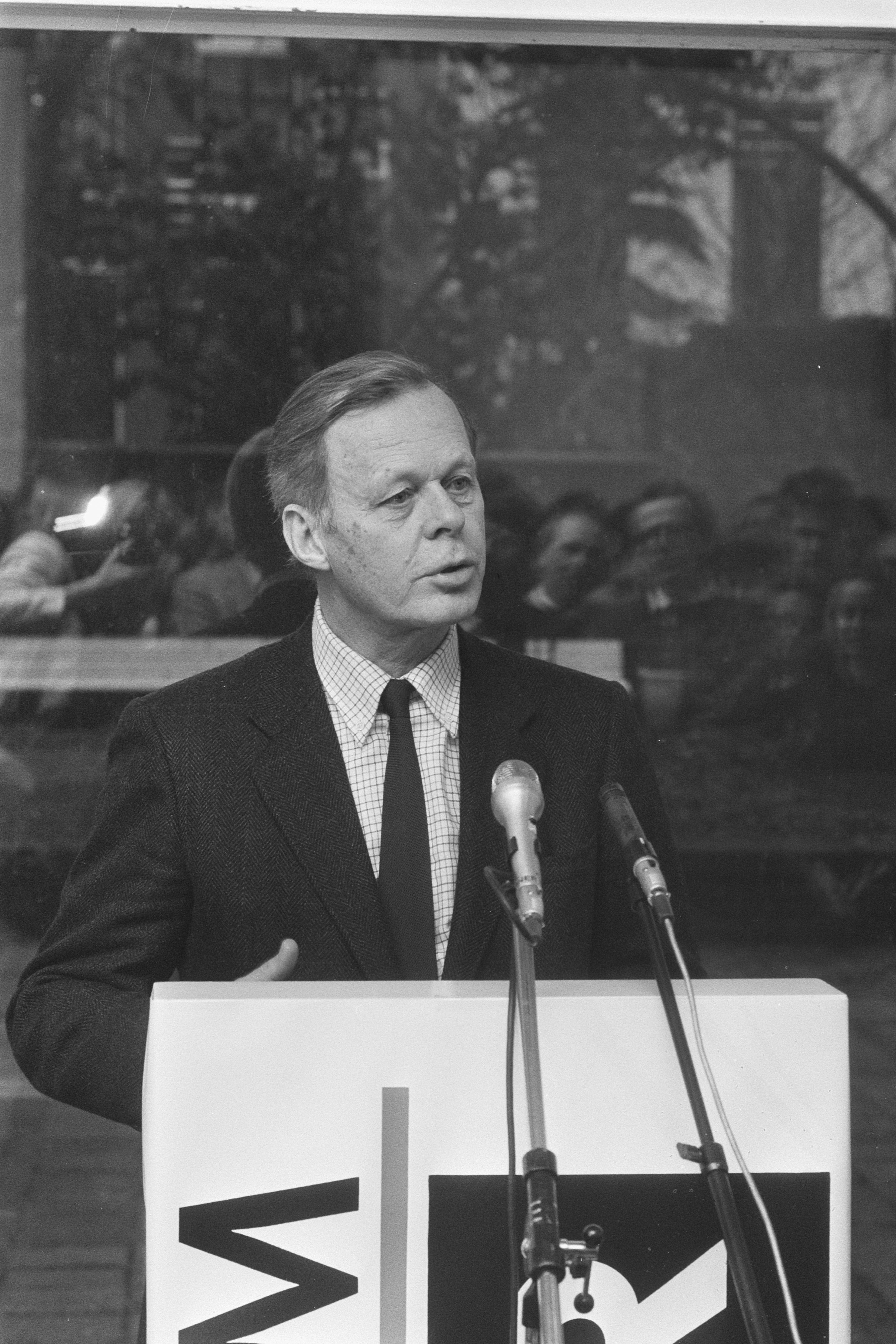 Collectie / Archief : Fotocollectie Anefo Reportage / Serie : [ onbekend ] Beschrijving : De Prix de Rome 1986 (architectuur, stedenbouw en landschapsarchitectuur) wordt uitgereikt in Apeldoorn. Juryvoorzitter Frans van Gool licht toe Datum : 16 januari 1987 Locatie : Apeldoorn, Gelderland Trefwoorden : prijzen, uitreikingen Persoonsnaam : Gool, F J. van Instellingsnaam : Prix de Rome Fotograaf : Molendijk, Bart / Anefo Auteursrechthebbende : Nationaal Archief Materiaalsoort : Negatief (zwart/wit) Nummer archiefinventaris : bekijk toegang 2.24.01.05 Bestanddeelnummer : 933-8622